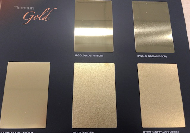 IPG2